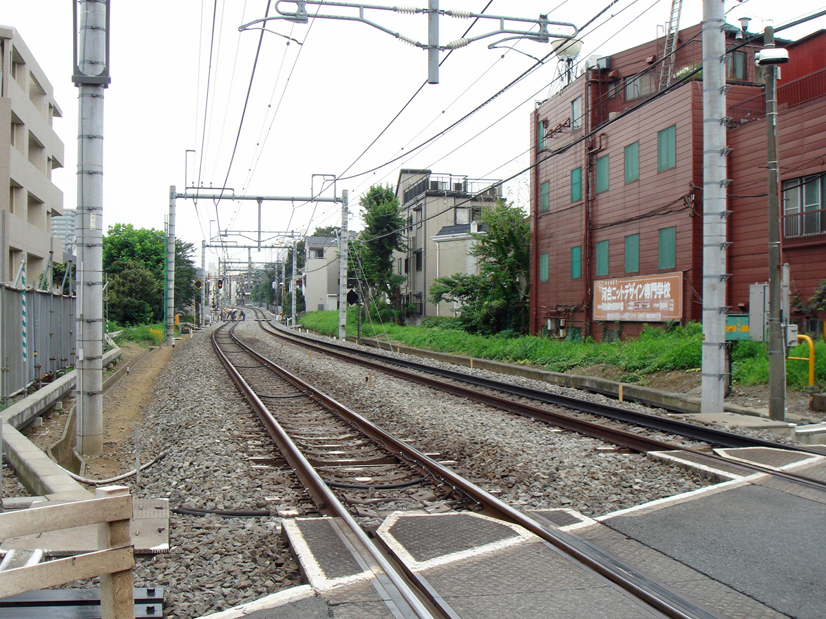 1953年に廃止された西武池袋線上り屋敷駅跡